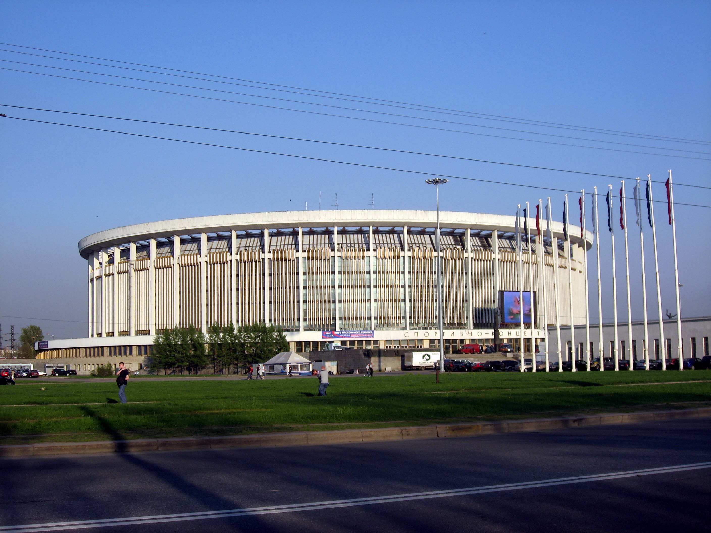 Sankt-Petěrburg (Petrohrad), stadion